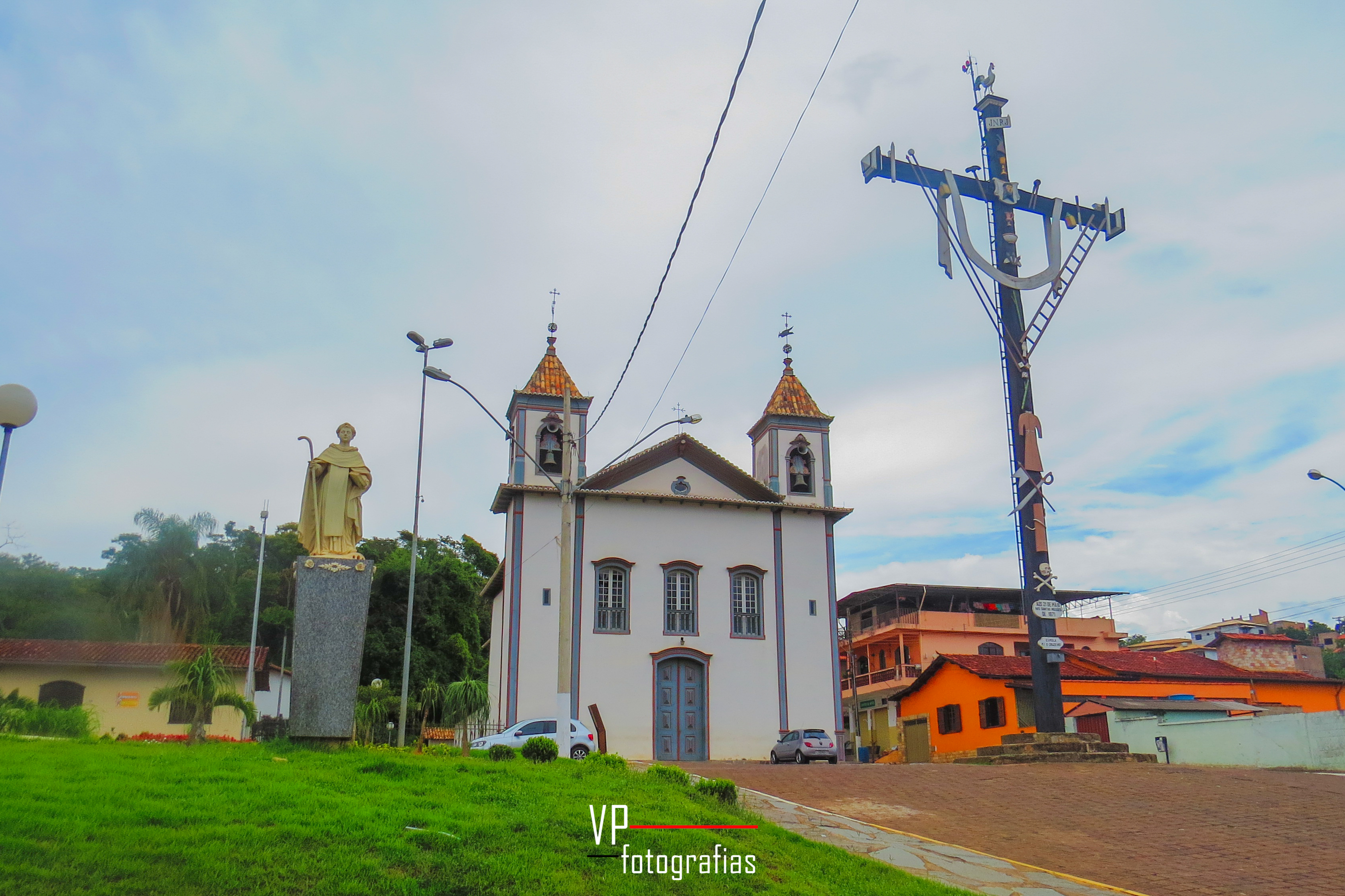 São Gonçalo do Rio Abaixo - State of Minas Gerais, Brazil